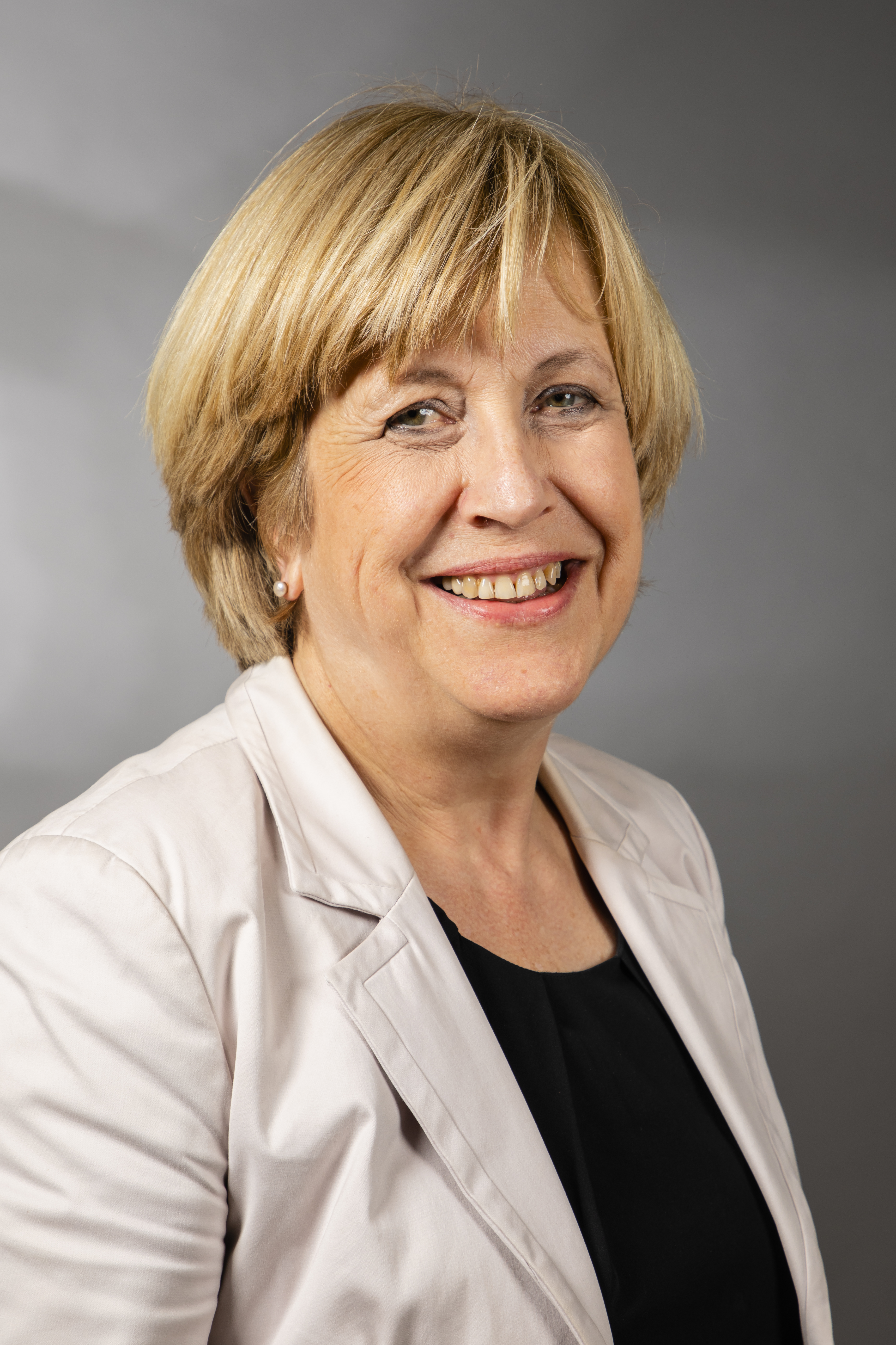 Elisabeth Müller-Witt Wikipedia-Landtagsprojekt NRW 2019 22 March 2019 in DüsseldorfThis file was taken during the project “Landtag Nordrhein-Westfalen 2019” (German). Organisation: Olaf KosinskyPhotography: Foto-AG Gymnasium Melle: Karsten Mosebach, Anna Borchert, Lara Diekmann, Marieke Eckjans, Neele Grieger, Charlotte Meyran, Carolin Möller, Leoni Potts, Alicia Wulbusch Usage information If you need more information how to use this file, please send an email to . The making of this document was supported by Skillshare. Personality rights warningAlthough this work is freely licensed or in the public domain, the person(s) shown may have rights that legally restrict certain re-uses unless those depicted consent to such uses. In these cases, a model release or other evidence of consent could protect you from infringement claims.